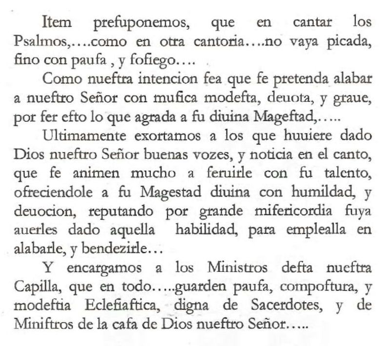 detalle de las Constituciones de la capilla Colegio